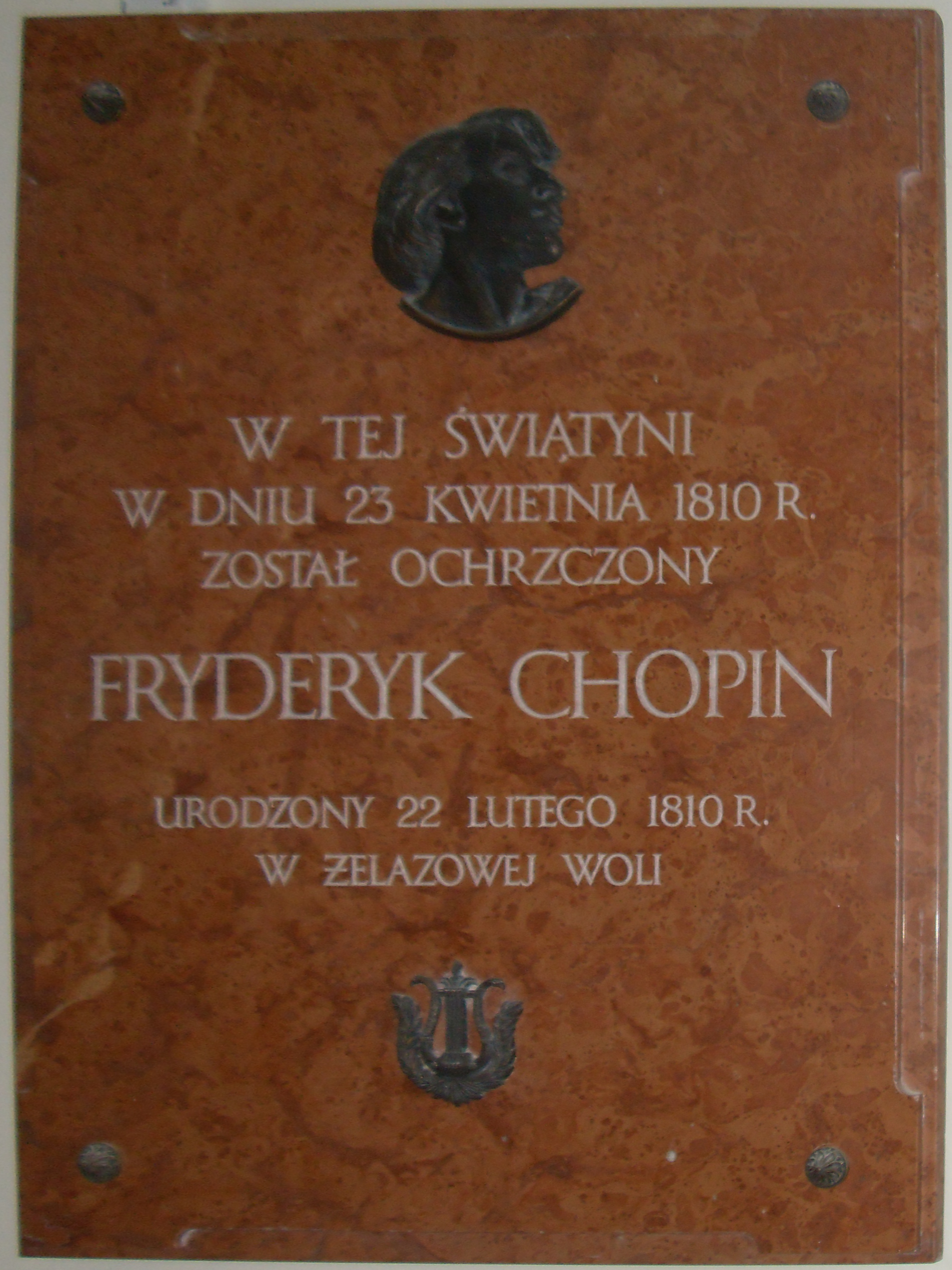 Tablica ku czci Fryderyka Chopina w kościele w Brochowie.